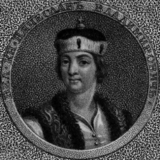 Вел. кн. Вячеслав Владимирович.